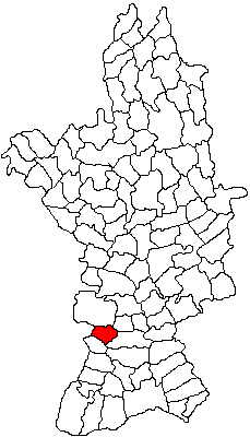 Categorie:Hărţi ale judeţului Olt